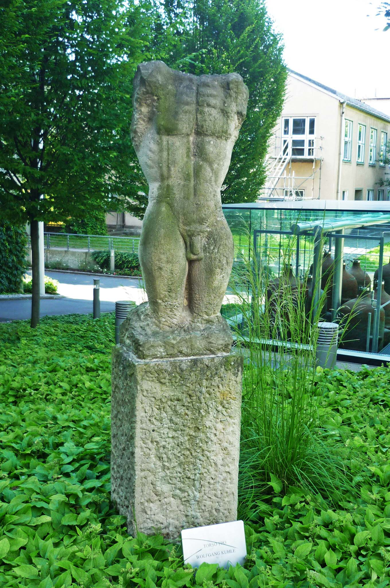 Torso von Wolfgang Kuhle (1983) – Skulptur an der Helmholtzstr. 20